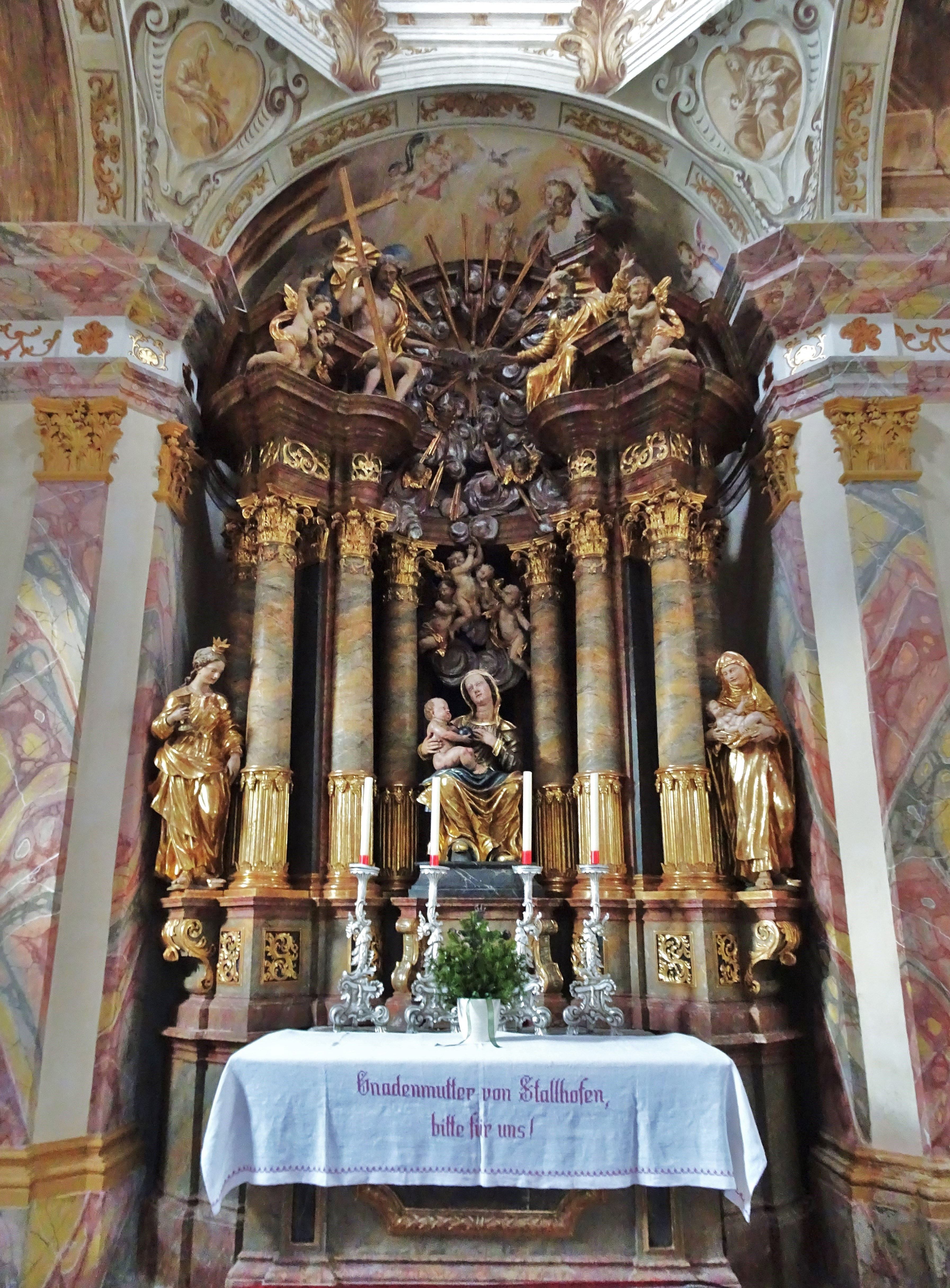 Kath. Filialkirche Hl. Maria (Maria Tax) Stallhofen (Obervellach), Altar der Stampfer-Kapelle